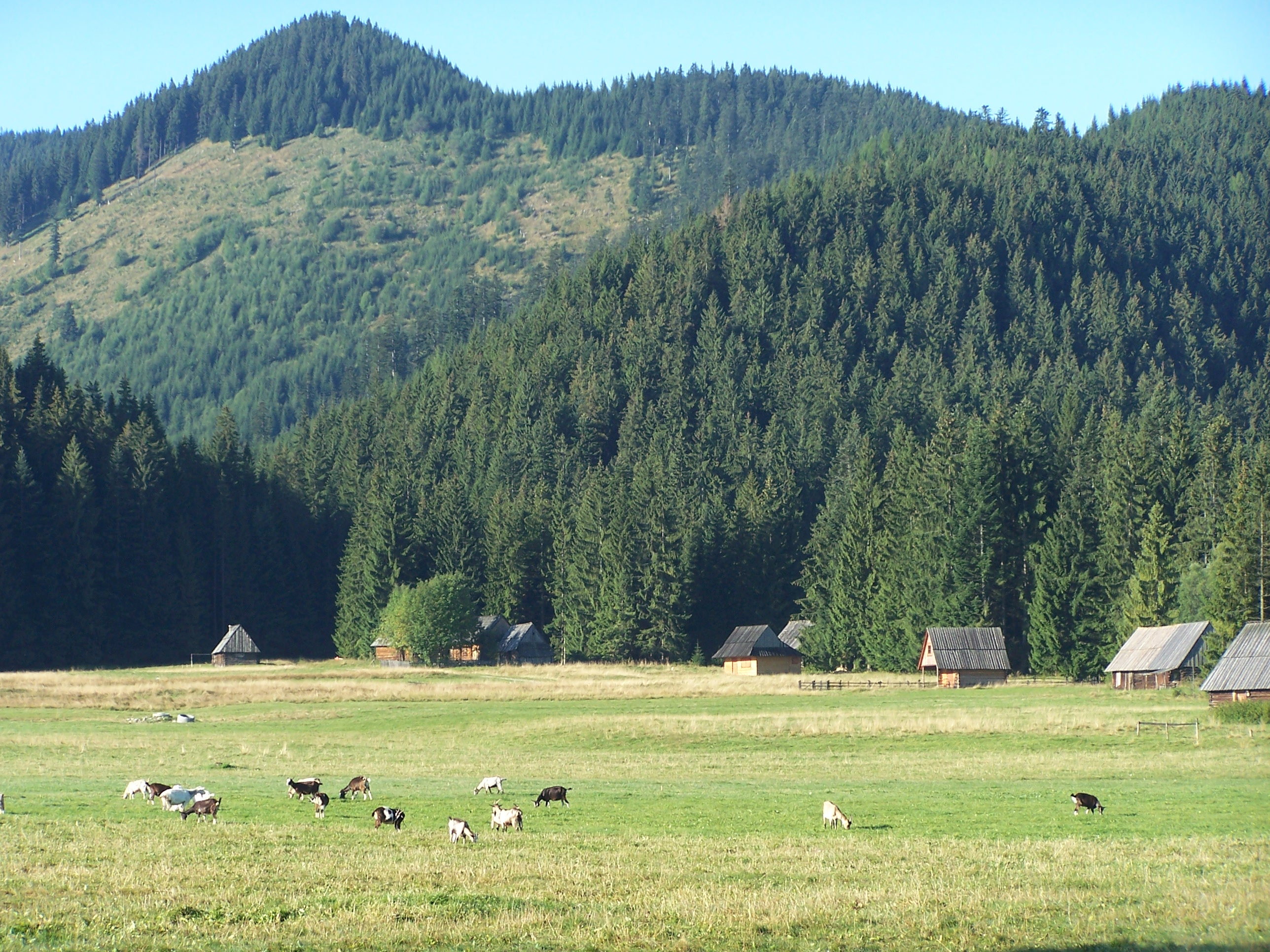 Polana Biały Potok (Tatra Mountains)